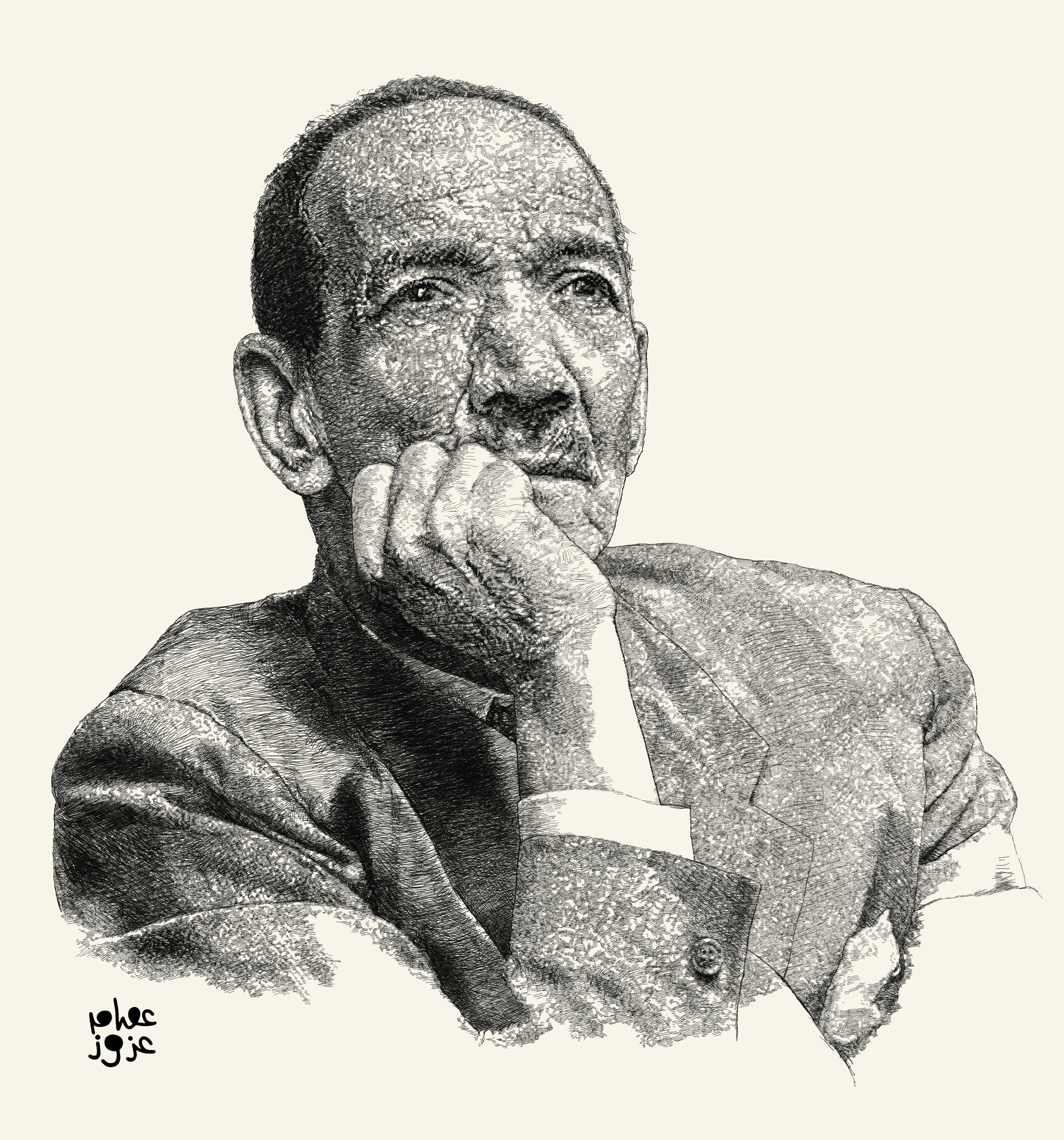 الشاعر أحمد رامي ريشة الفنان عصام عزوز